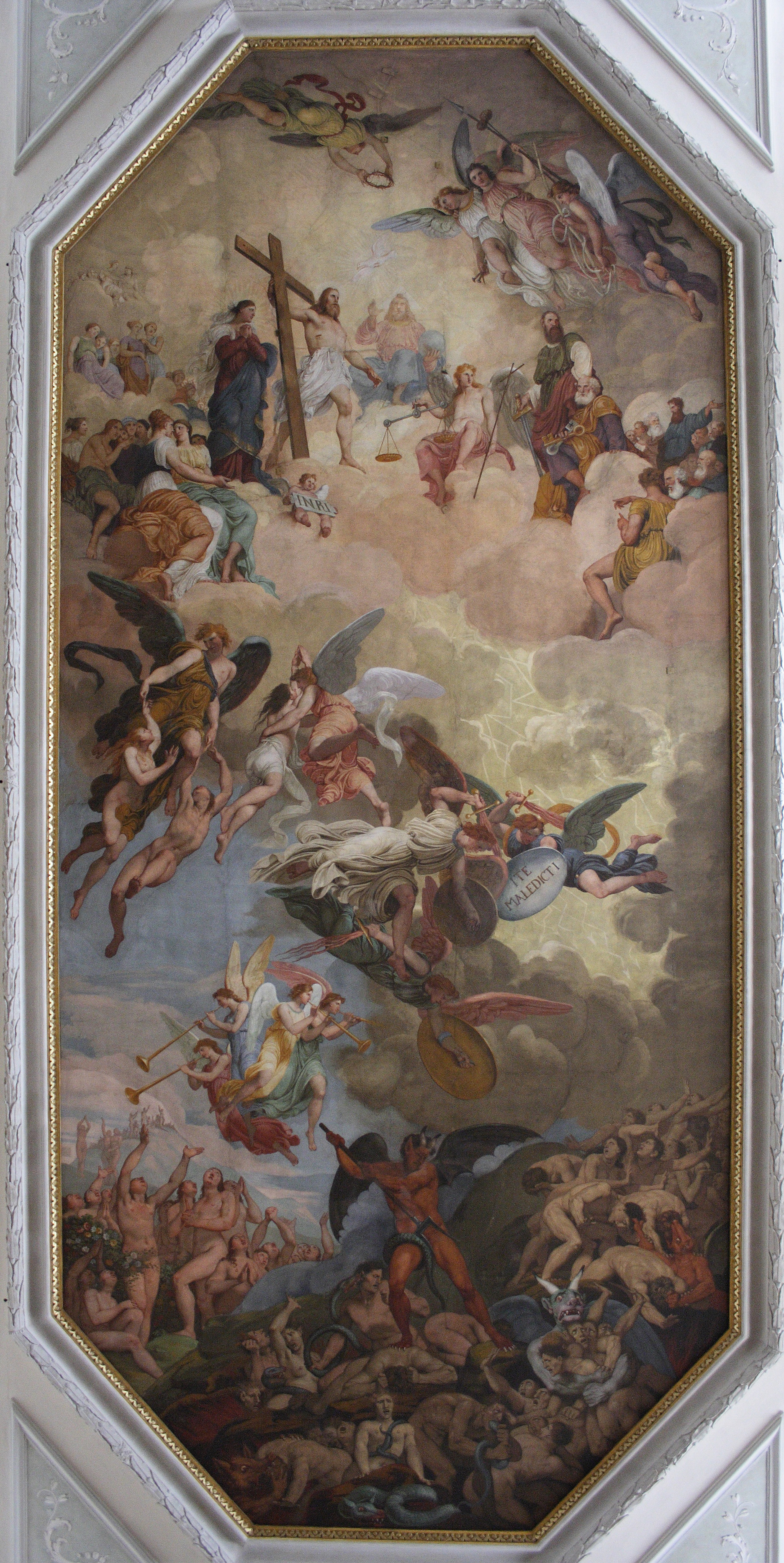 Soffitto della chiesa parrocchiale di Paderno del Grappa, affresco di Giovanni De Min, anno 1824